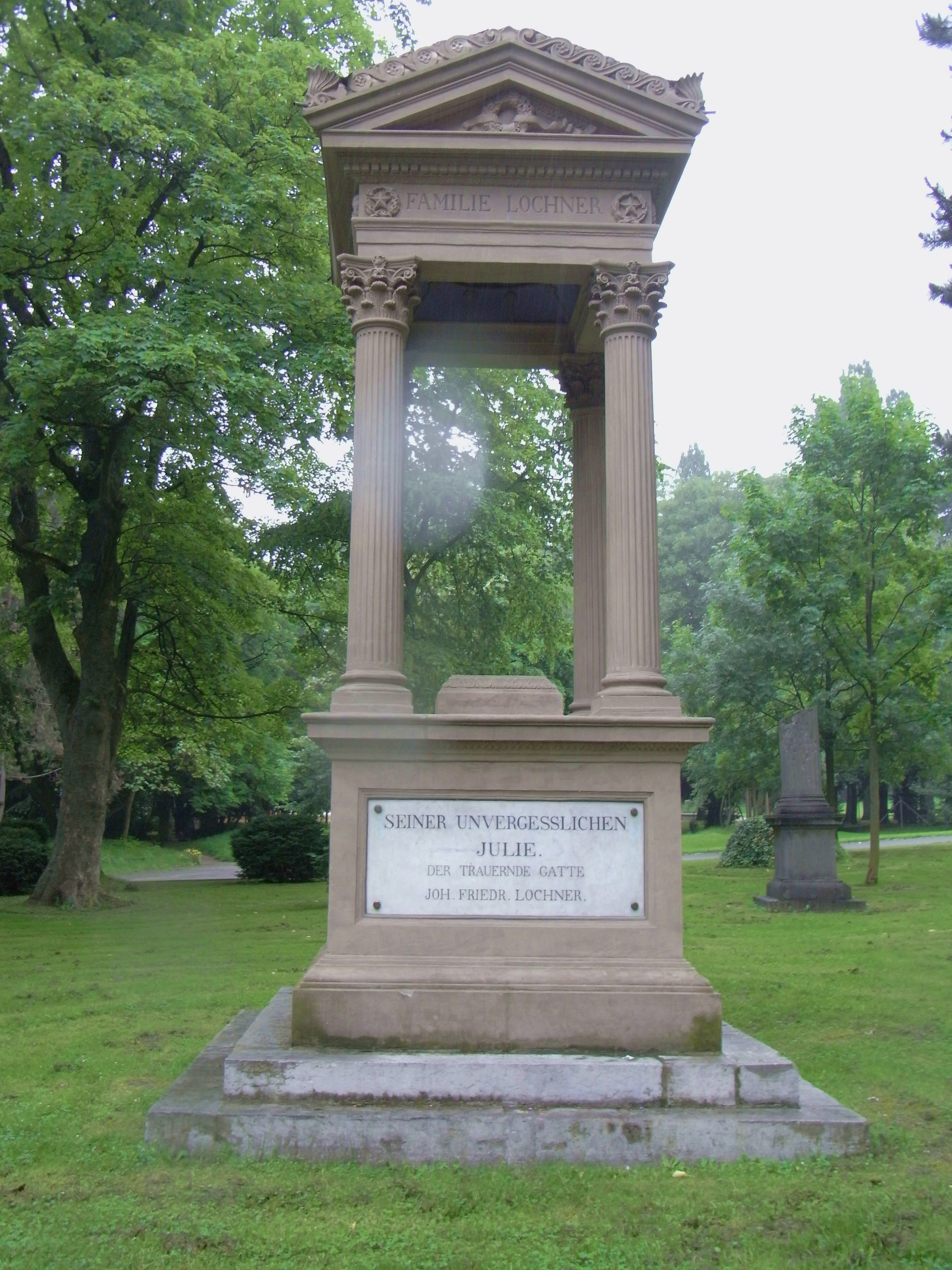 Grabstätte Lochner auf dem ehem. ev. Friedhof Aachen im Kurpark Monheimsallee